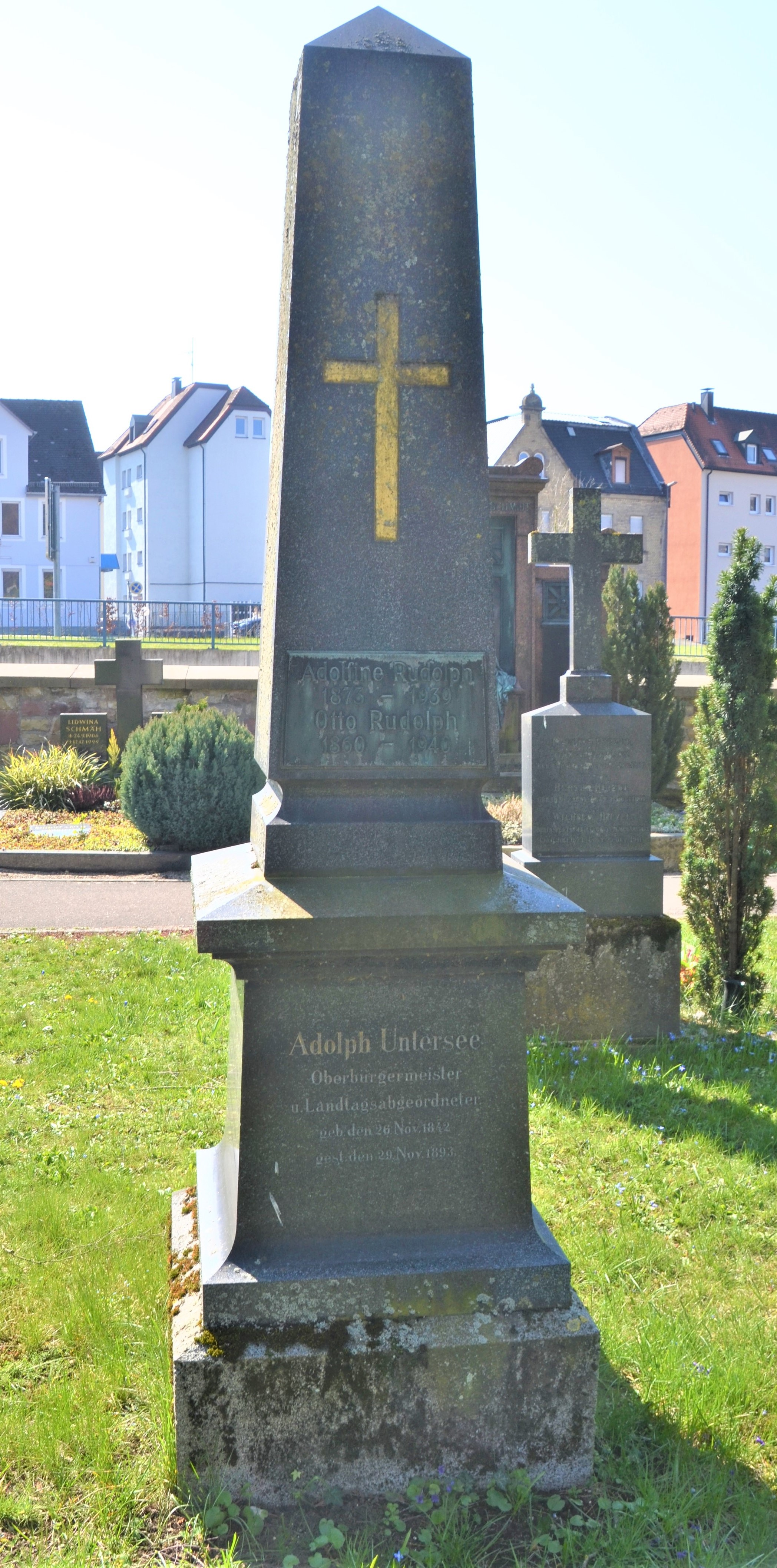 Grabmal des ehemaligen Oberbürgermeisters von Schwäbisch Gmünd auf dem Leonhardsfriedhof Gmünd